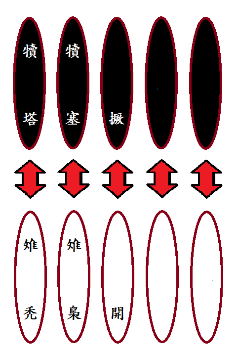 五木共四種面